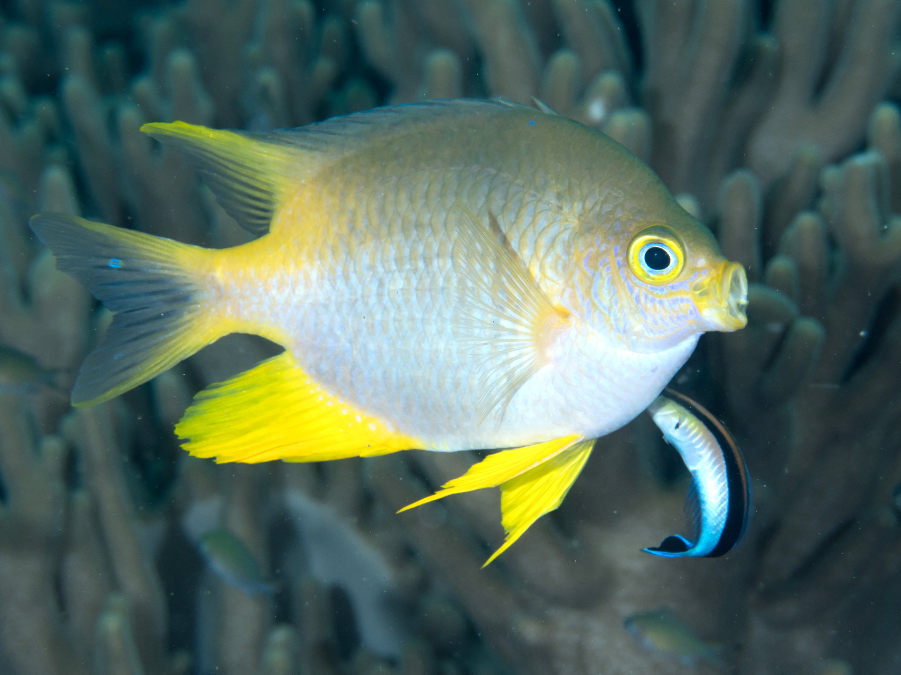 Indonesia / Raja ampat 2019 - Golden damselfish (Amblyglyphidodon aureus)